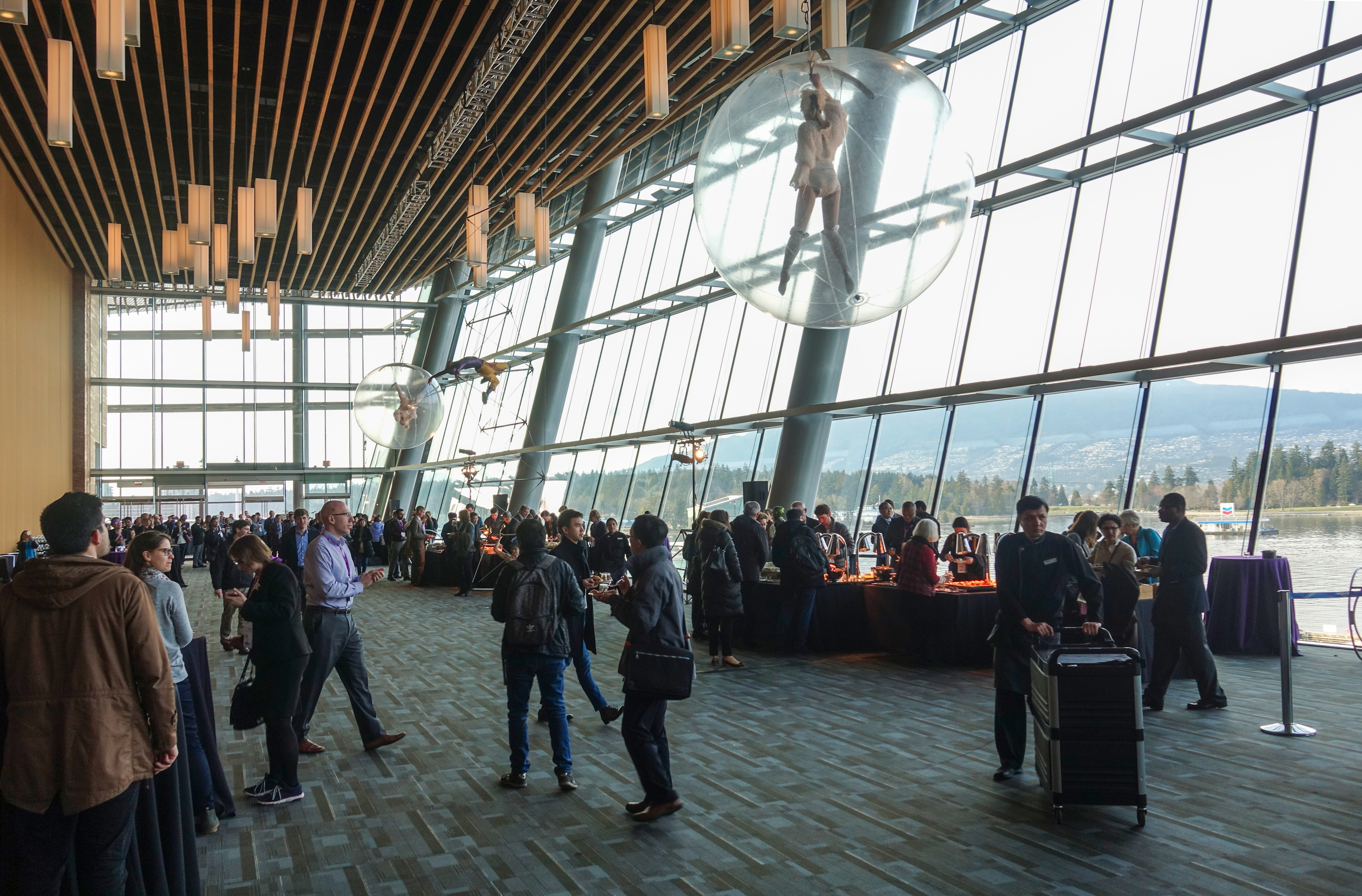 USCAP 2018 Vancouver DSC01784